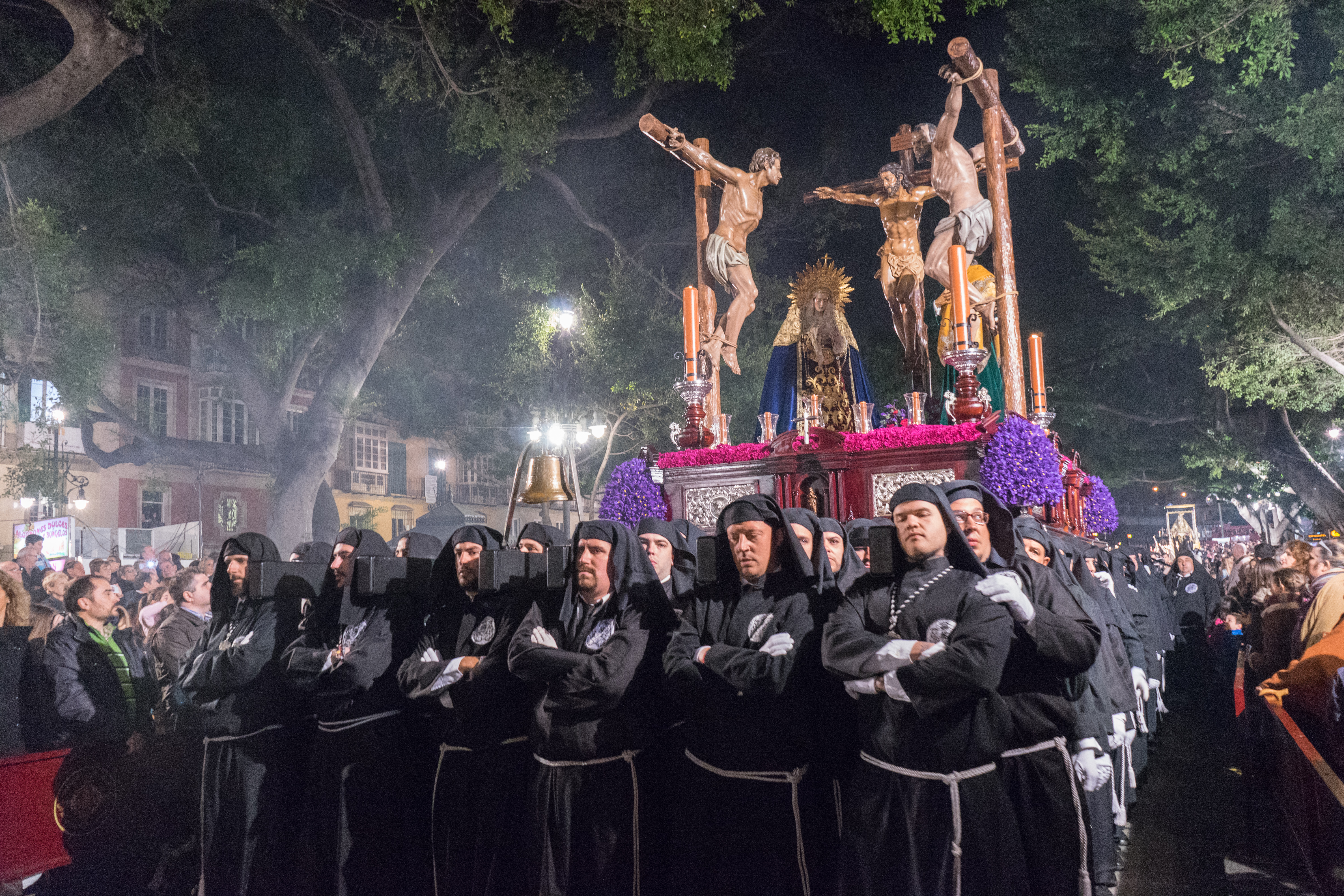 Trono del Cristo de la Antigua Cofradía del Stmo. Cristo del Perdón y Ntra. Sra. de los Dolores This is a photography of a Folklore festival in Spain (Wikidata id Q9075883).